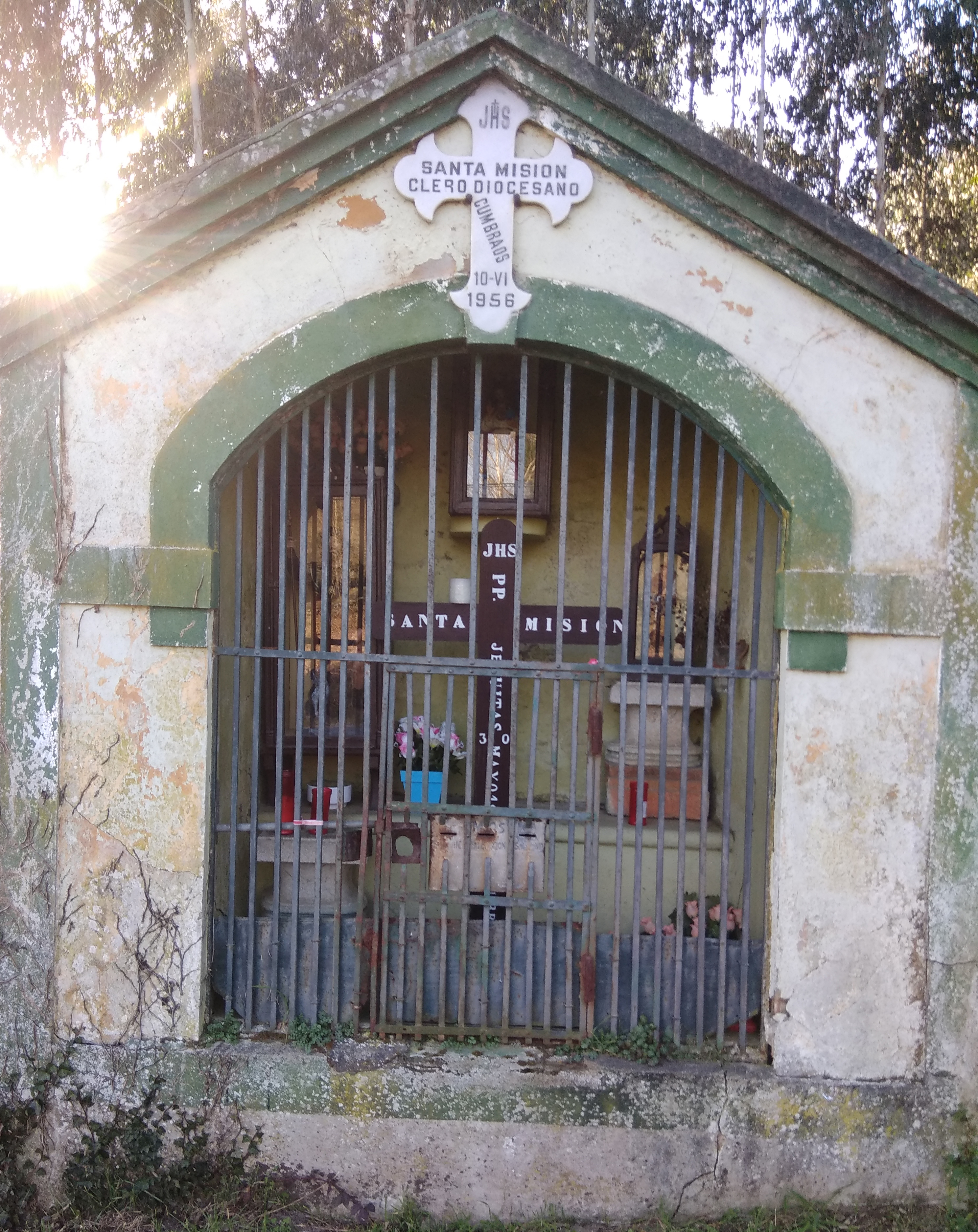 Peto de ánimas en Cumbraos (Sobrado, Galiza) nas inmediacións da Torre e das Cruces.